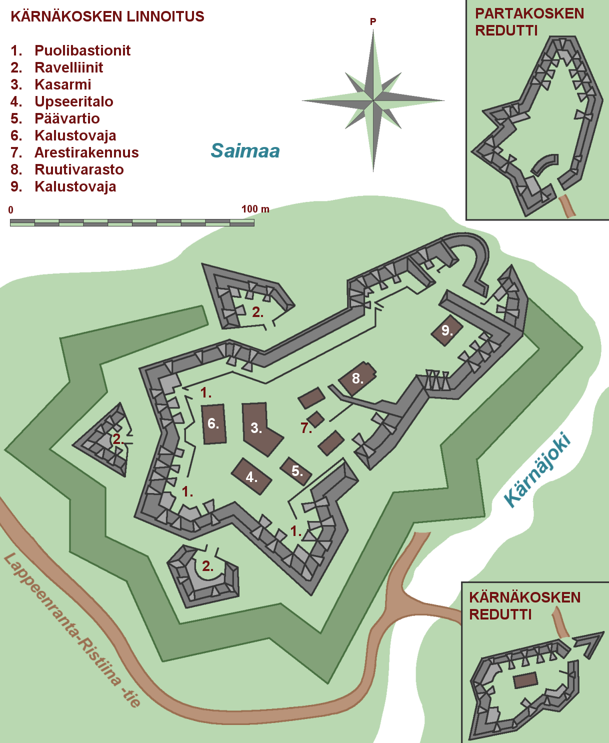 Kärnäkosken linnoituksen sekä Kärnäkosken ja Partakosken reduttien pohjapiirustukset.